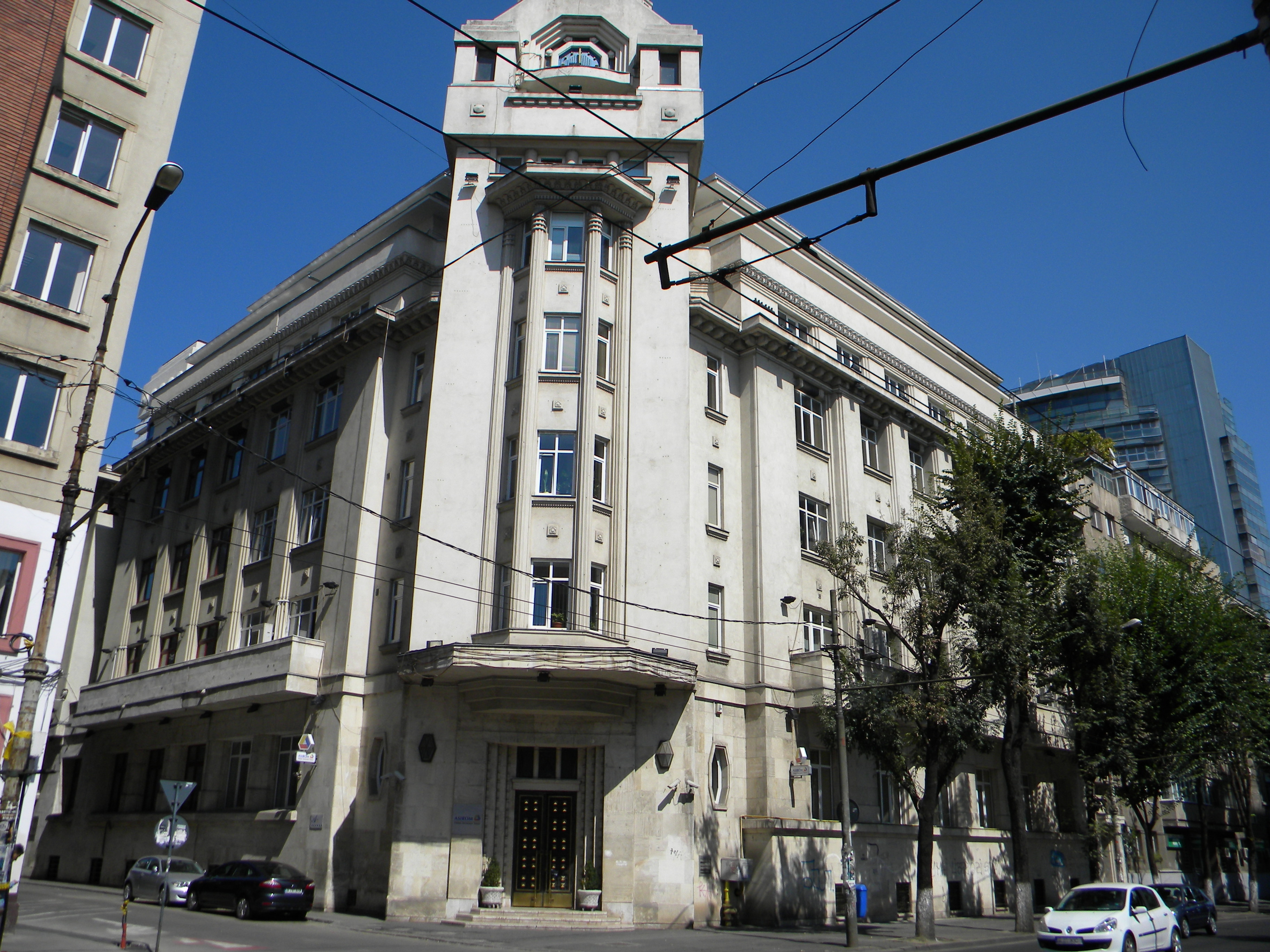 Bucuresti, Romania, Fostul Hotel National azi ASIROM, Bd. Carol I, nr. 31-33, sect. 2